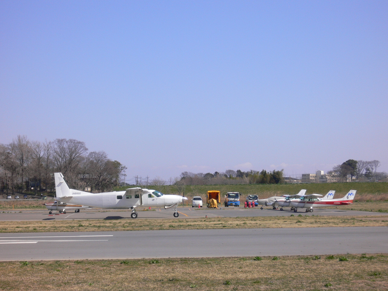 Аэропорт Хонда